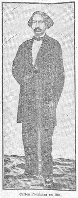 Retrato del escritor y periodista español Carlos Frontaura hacia 1861, en Heraldo de Madrid.